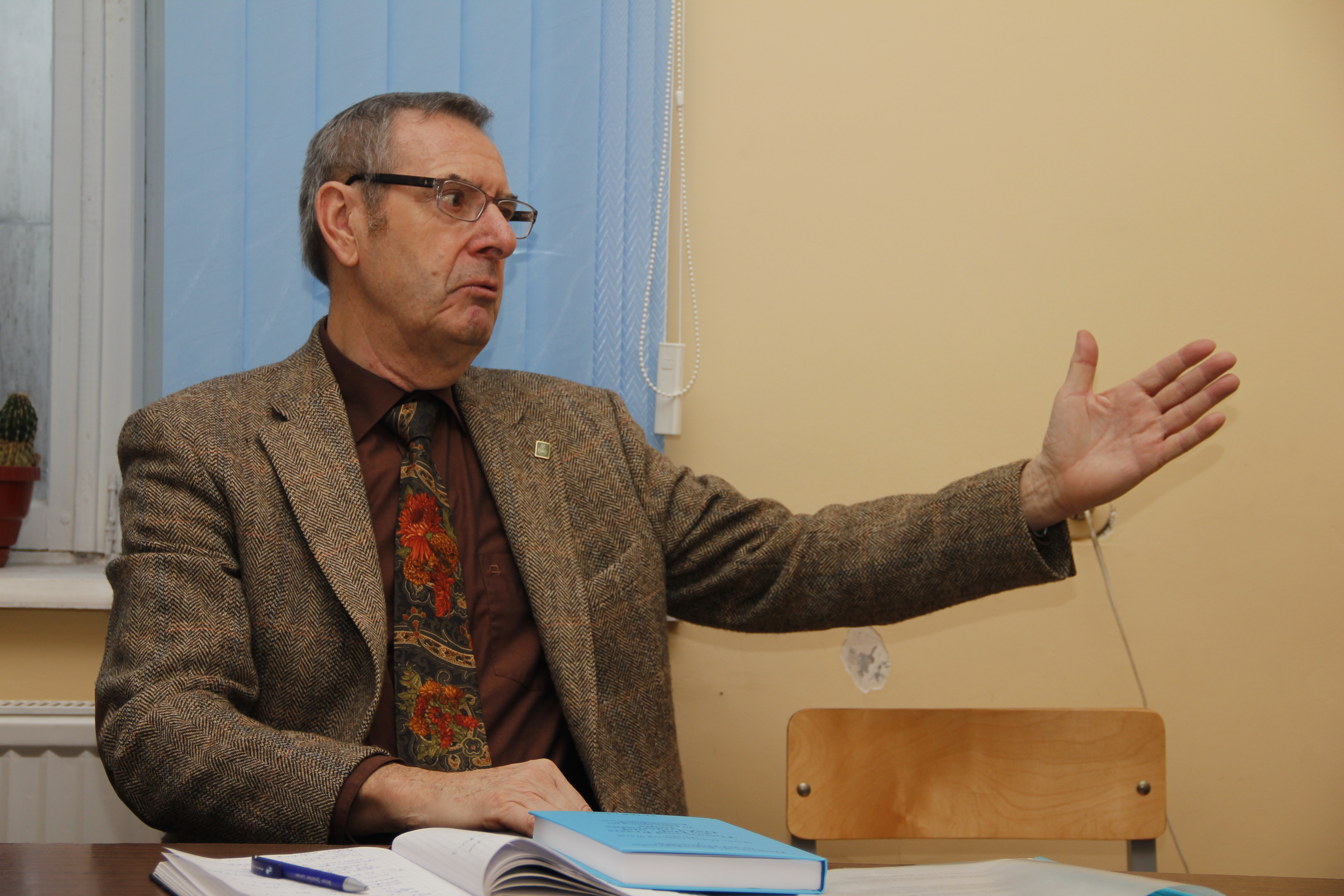 Foto: Prof. Dr. Dr. Gerhard Wazel